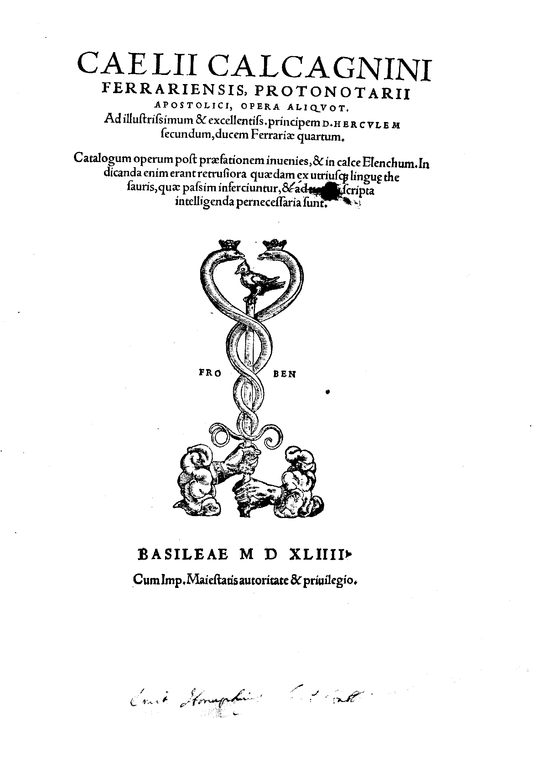 Caelii Calcagnini Ferrariensis, ... Opera aliquot. Ad illustrissimum & excellentiss. principem D. Herculem secundum, ducem Ferrariae quartum. Catalogum operum post praefationem inuenies, & in calce elenchum. .... - Basileae : [Hieronimus Froben & Nicolaus Episcopius], 1544 (Basileae : per Hier. Frobenium et Nic. Episcopium, mense martio 1544). - [8], 657, [47] p. : ill. ; 2° .